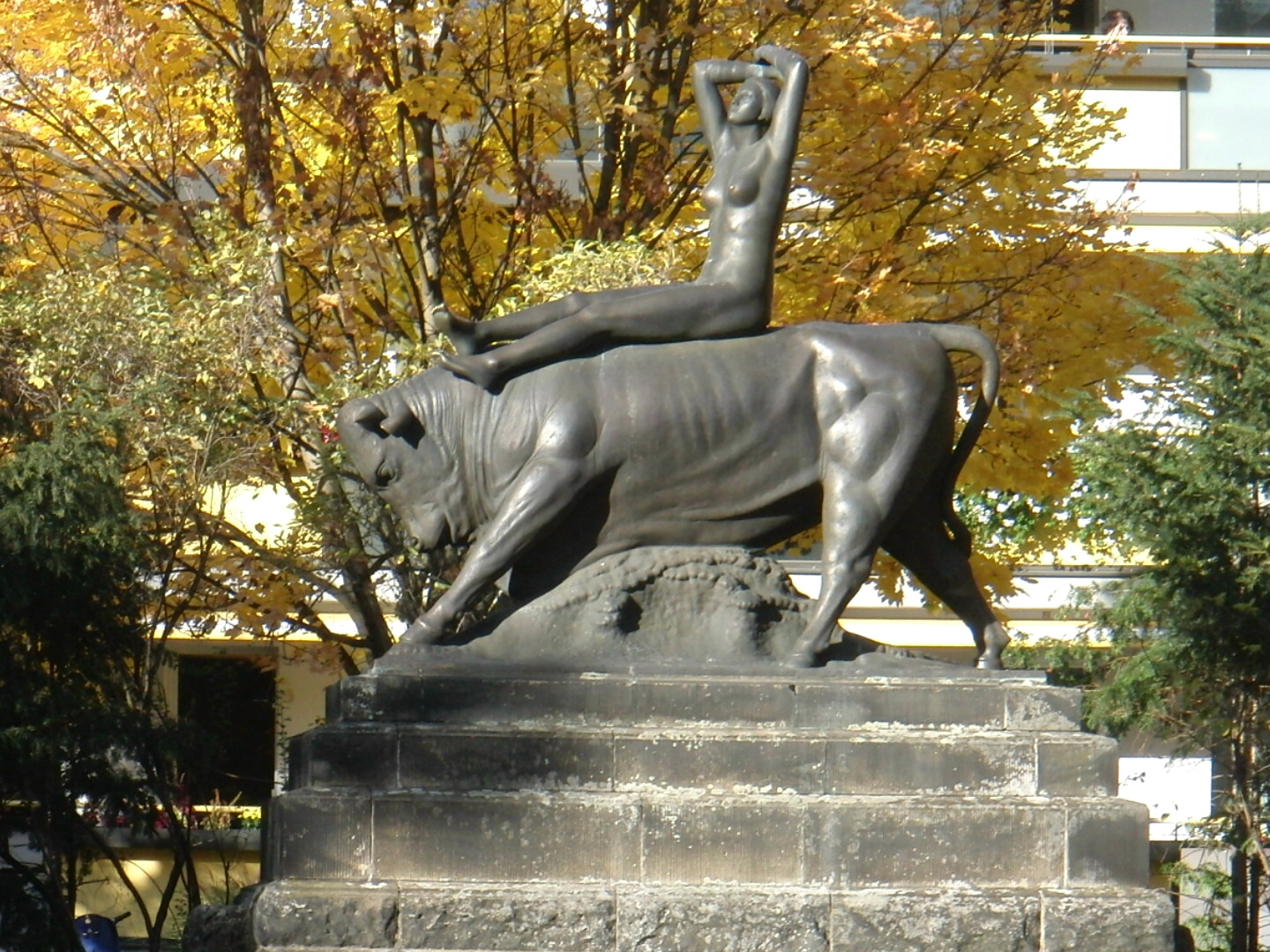 Dresden - Blasewitz: Europabrunnen am Königsheimplatz